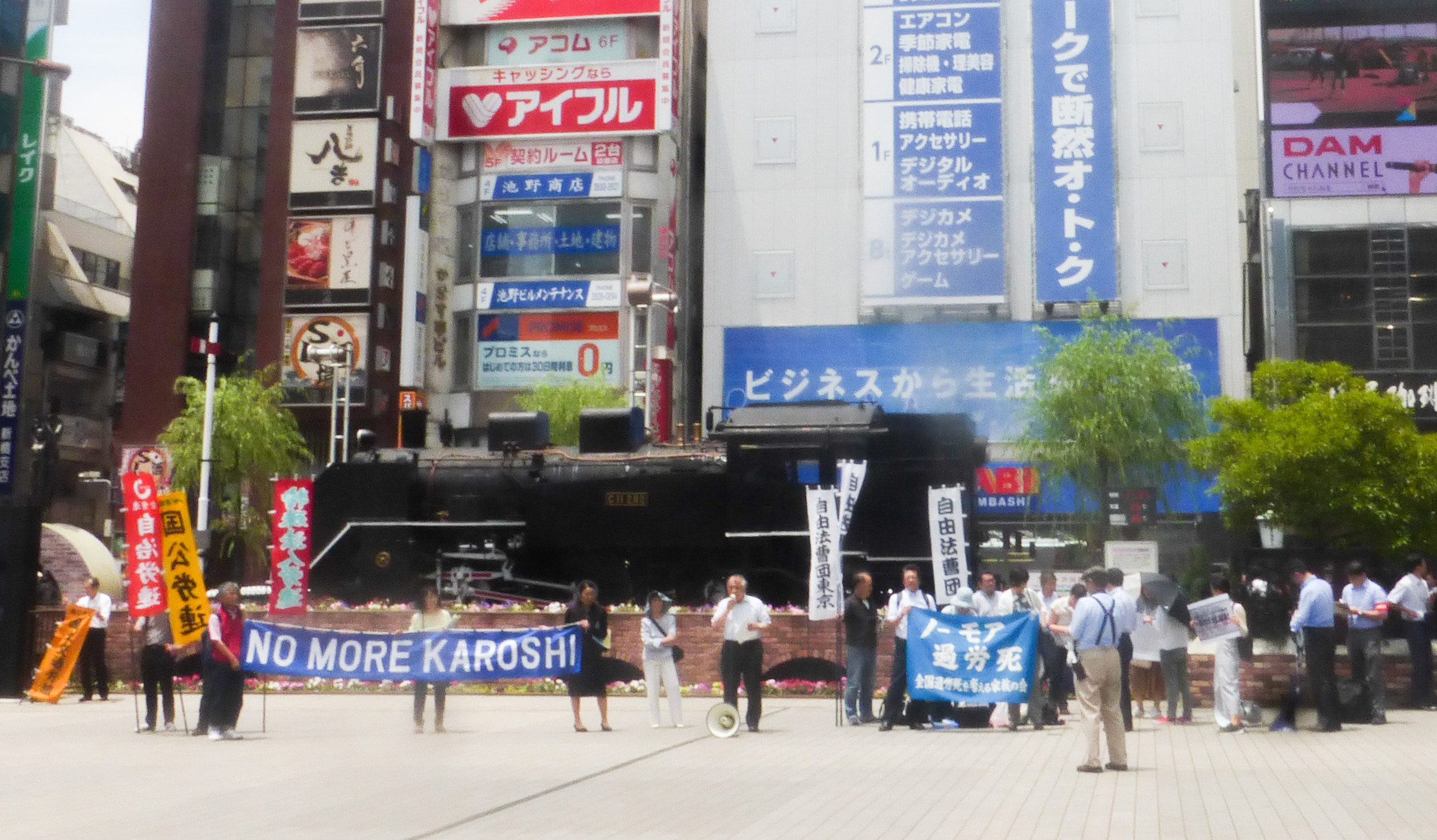 "No more karoshi" protest in Shimbashi (ノーモア過労死のデモ、新橋にて)